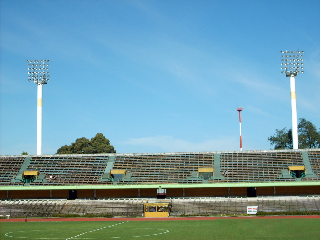 Estadio Municipal de Concepción - Municipal stage of Conception